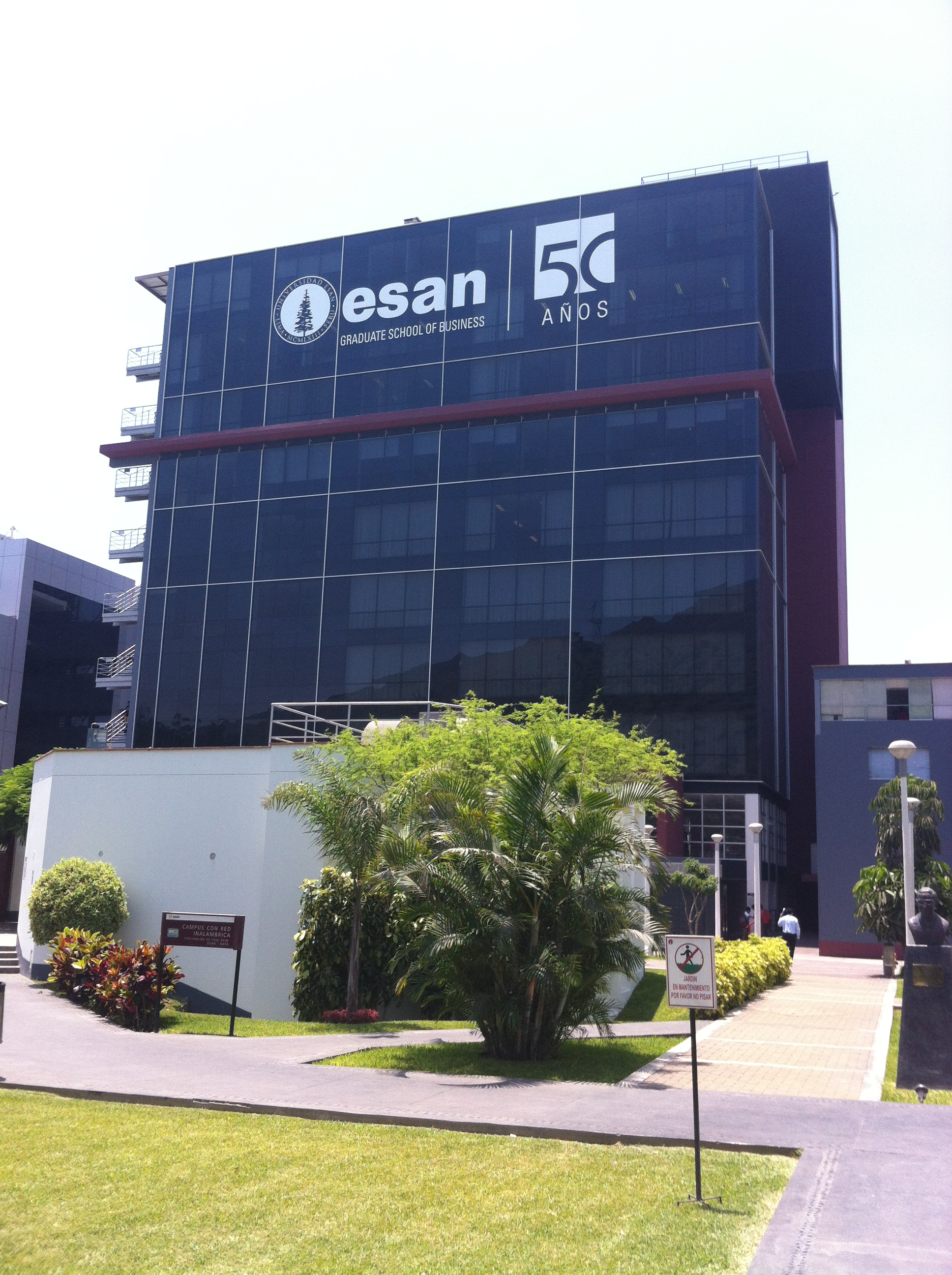 Edificio D de ESAN tomada por Alfredo Abusada